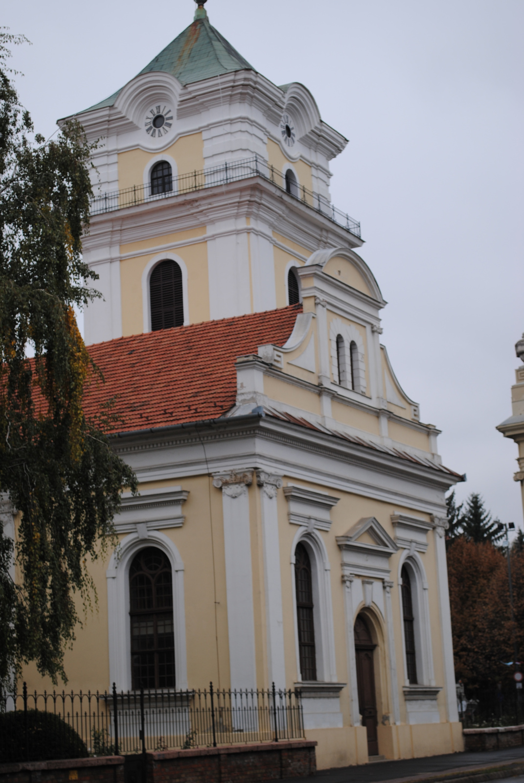 Evangélikus kistemplom (Békéscsaba, Szeberényi tér 1.)